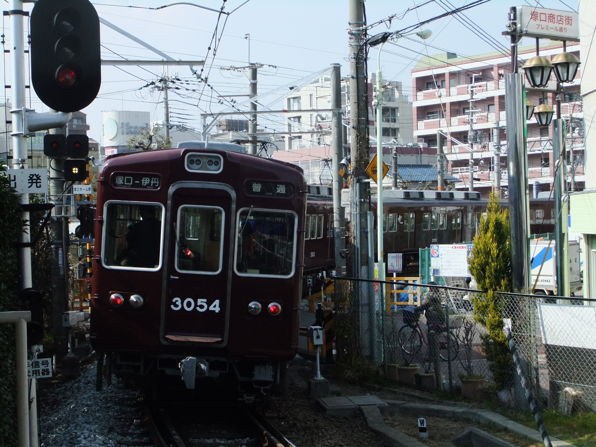 前照灯がLED化された阪急3054号